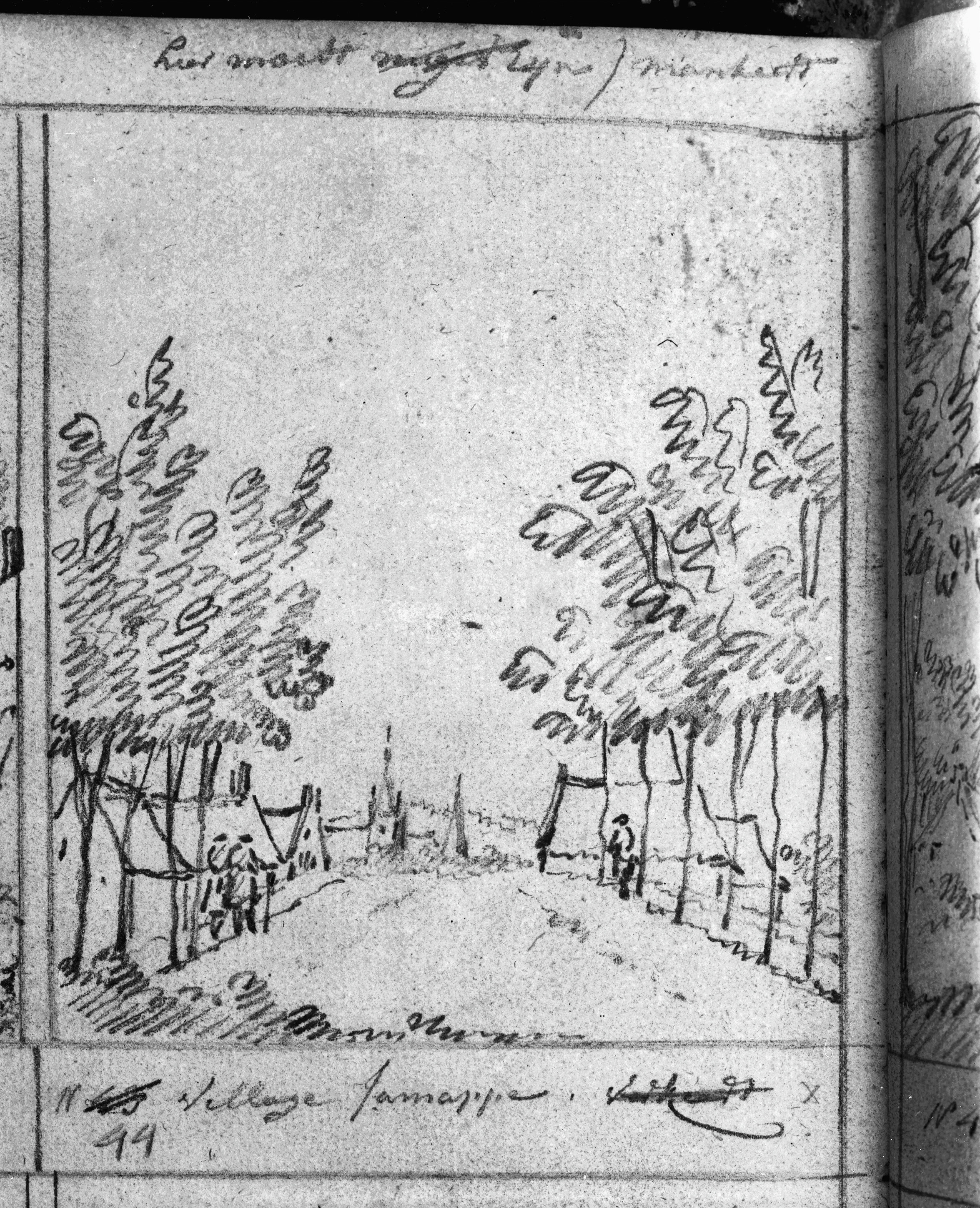 Dorpsgezicht: Dorpsgezicht, reproduktie uit schetsboek Dirk Verrijk